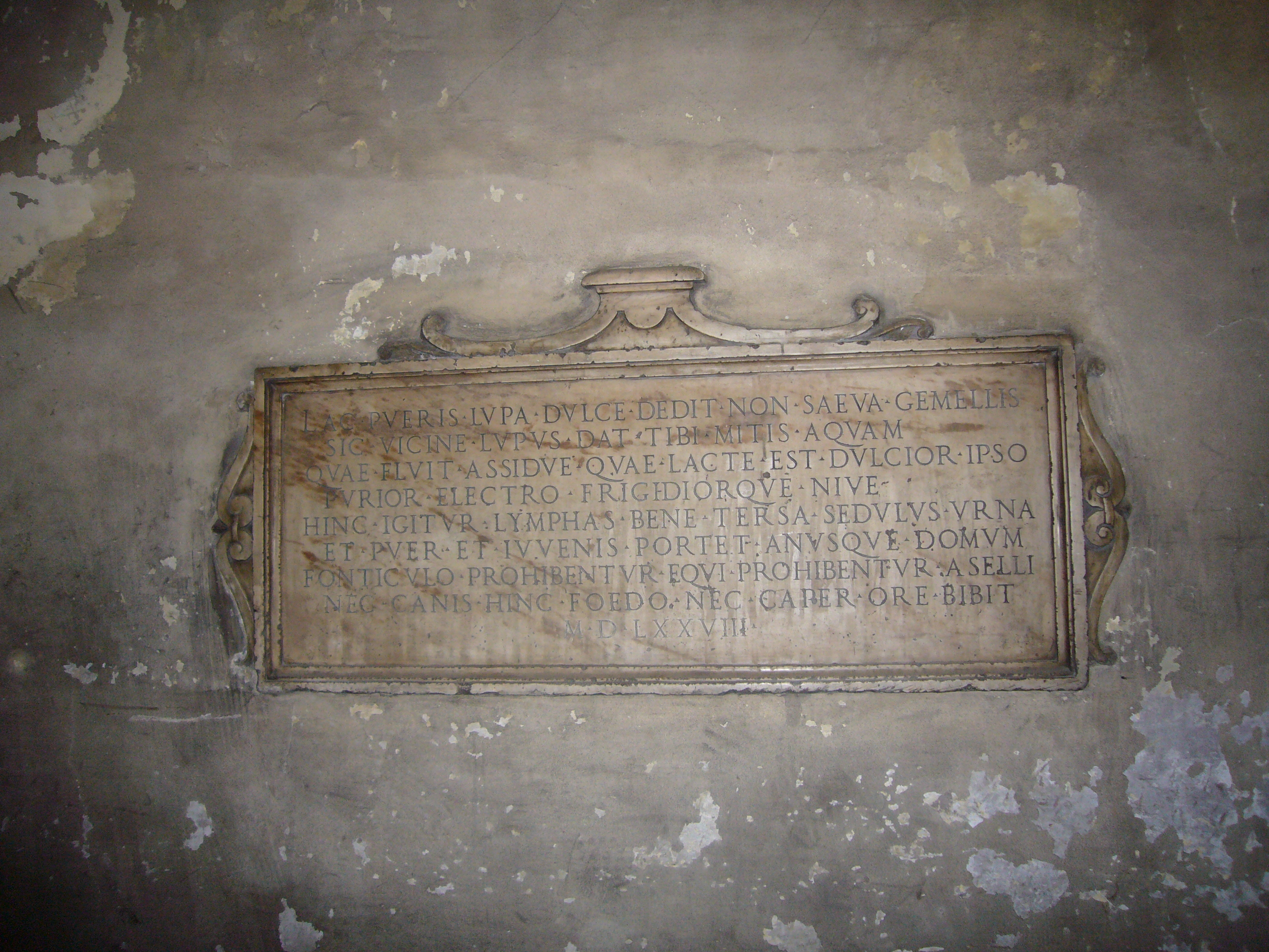 Roma, via dei Prefetti (Campo Marzio): Lapide di dedica della fontana della Lupa a Palazzo Capilupi. Il testo dice (in italiano): La lupa, mansueta, diede dolce latte agli infanti gemelli. Così, o vicino, il Lupo mansueto dà a te acqua che fluisce costante, più dolce dello stesso latte, più pura dell'ambra e più fredda della neve. Attinga pure da qui, con recipiente ben pulito, il solerte fanciullo, e ne portino a casa la giovane e la vecchia. Ma è vietato ai cavalli e ai somari di bere alla fontanella, e non bevano da qui, con il loro sozzo muso, né il cane né la capra. [anno] 1578.